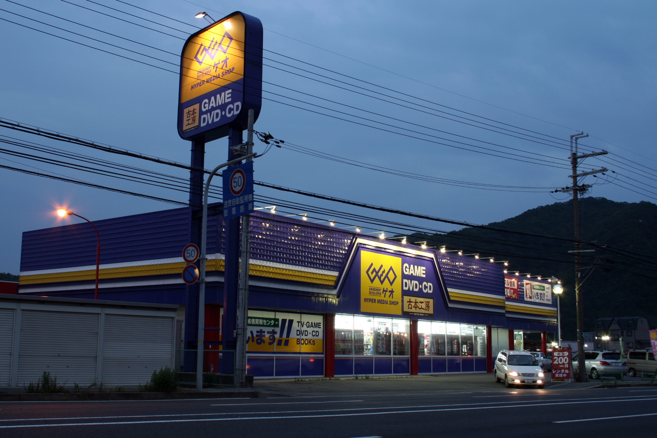 日本のレンタルビデオチェーン店のひとつ、ゲオ姫路砥堀店。夕刻撮影。